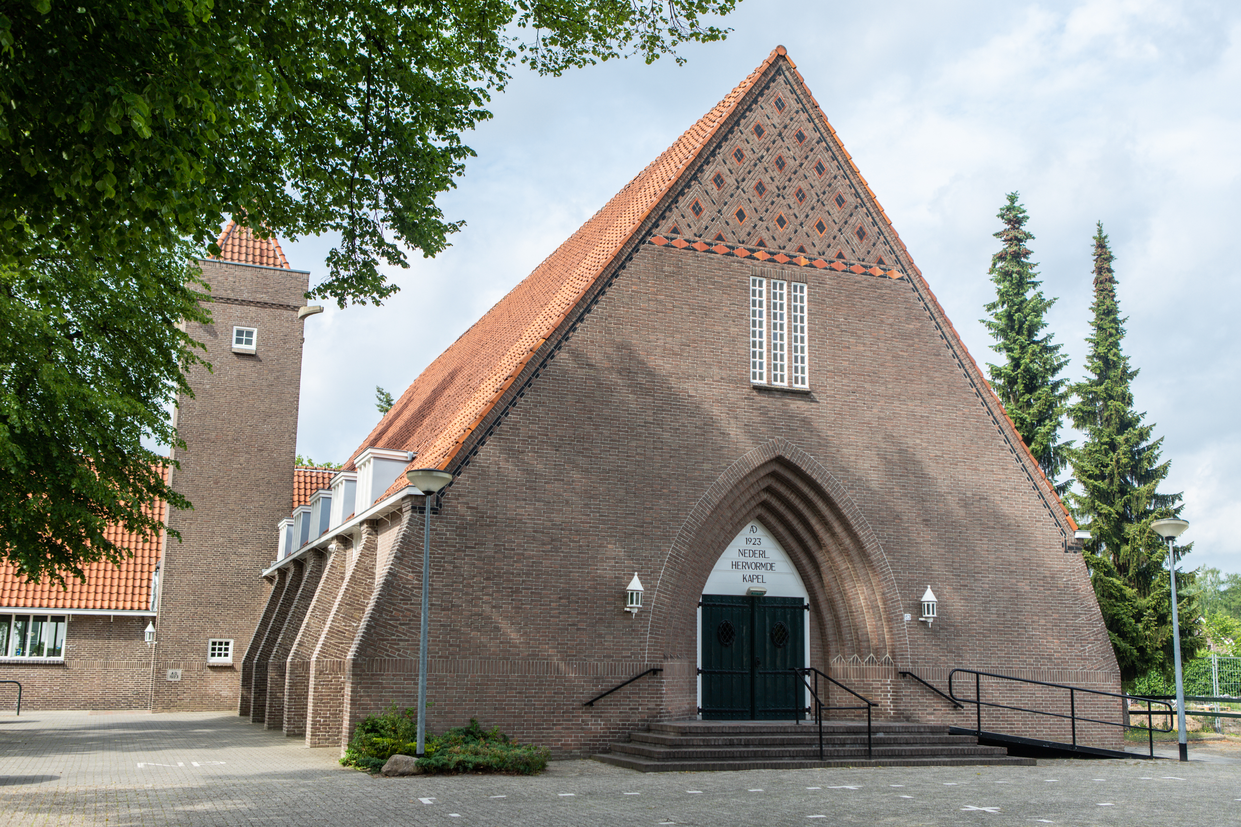 De Nederlands Hervormde Kerk te Emmen 2019